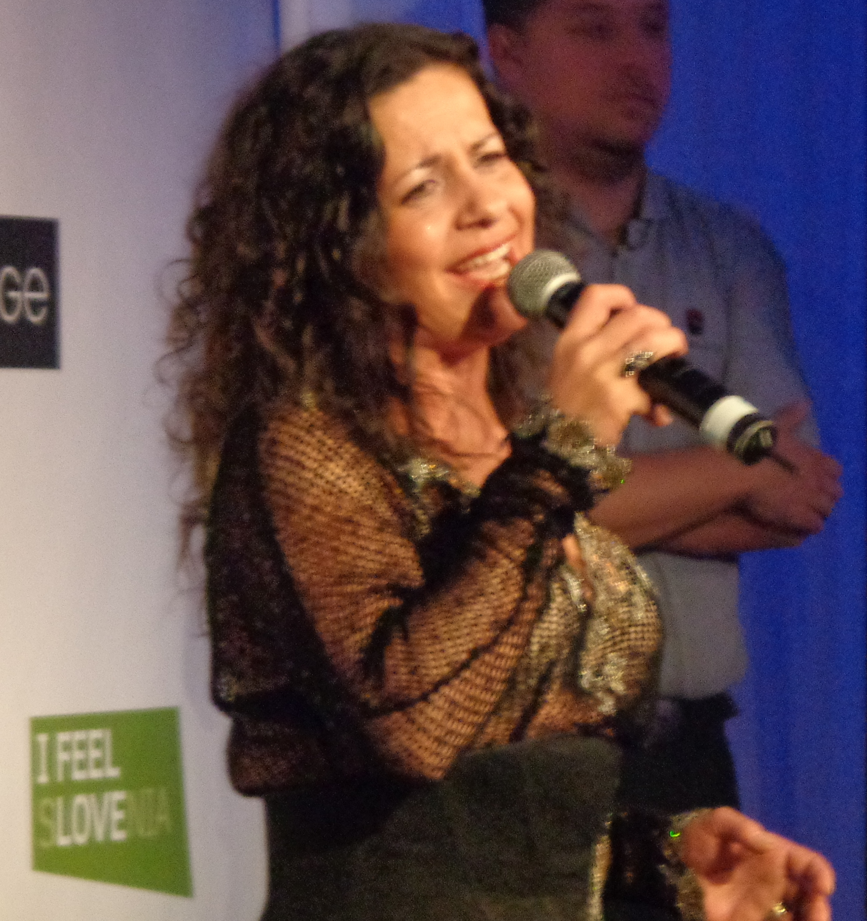 Darja Švajger performing at Euro Fan Cafe in Vienna, 2015.